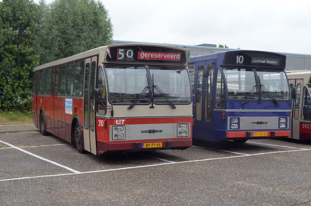 De Rotterdamse CSA-II bus RET 310 tijdens de viering, te Den Haag, van 50 jaar Standaard Stadsbussen in Nederland. Foto: Erik Swierstra.